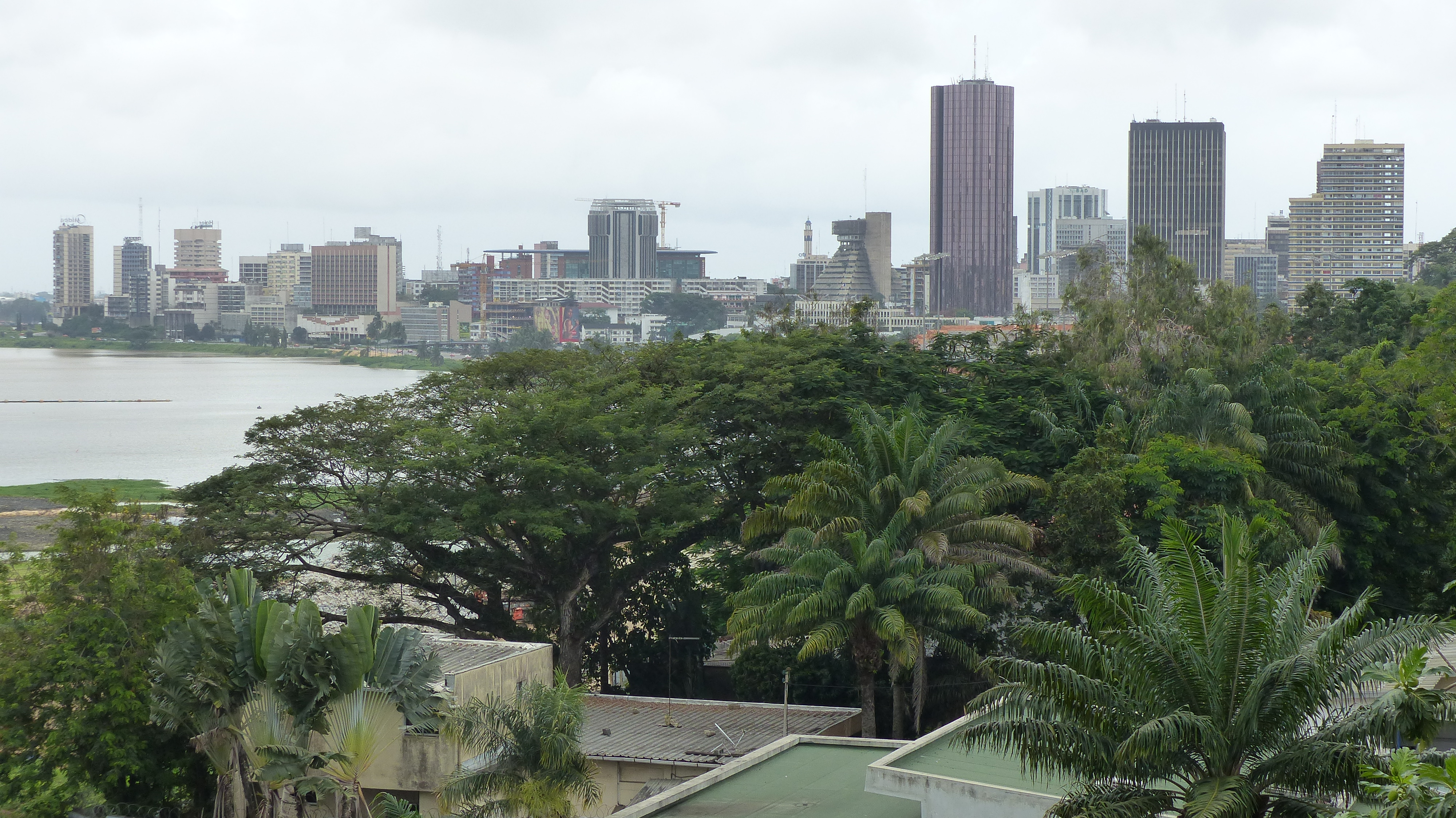 Quartier d'Affaires au Plateau à Abidjan